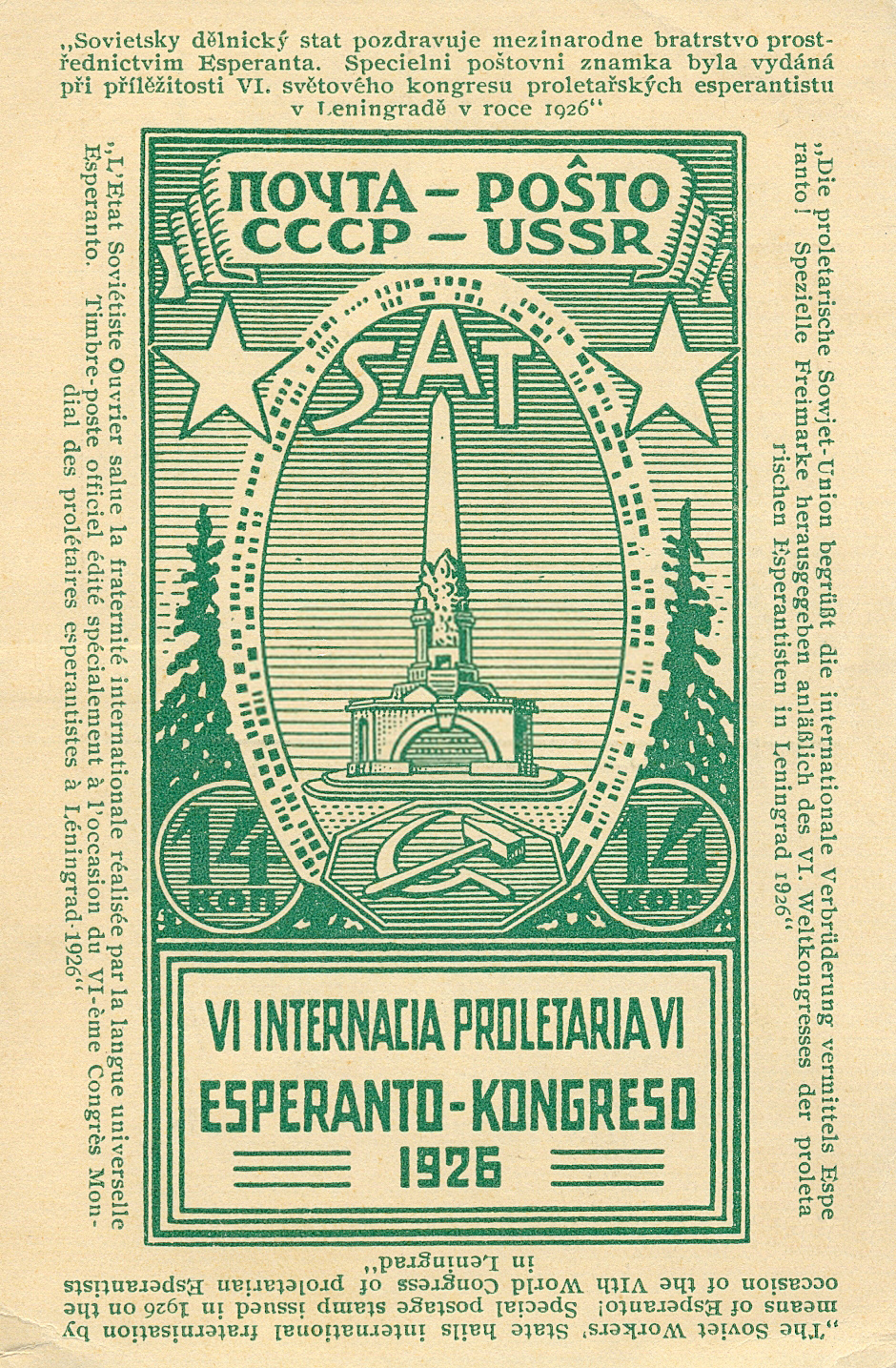 Poŝtkarto de la 6-a SAT-Kongreso en Leningrado kreita surbaze de poŝtmarko